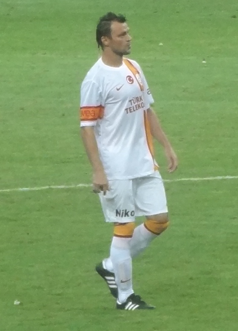 Tomáš Ujfaluši @ Fiorentina friendly